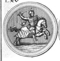 Philippe le Hardi